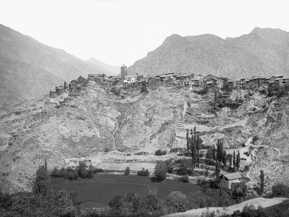 Imatge